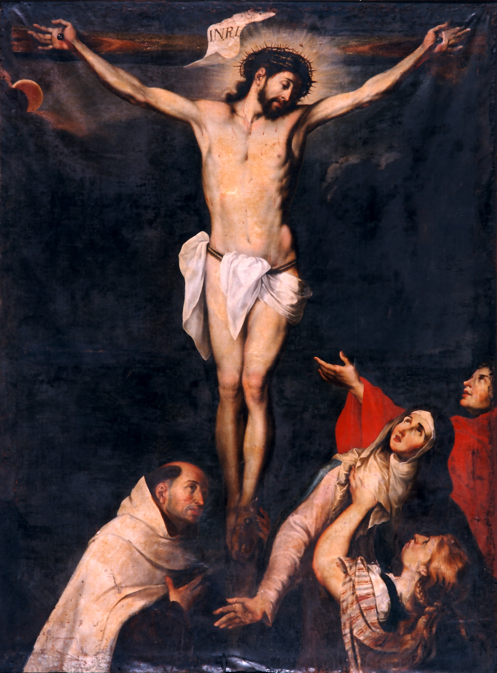 La obra representa a Jesucristo crucificado en el Monte Calvario, y a su derecha aparecen la Virgen María, San Juan Evangelista, María Magdalena, mientras que a su izquierda se encuentra un fraile carmelita que según una antigua tradición sería del pintor Fray Juan del Santísimo Sacramento, autor de esta obra.